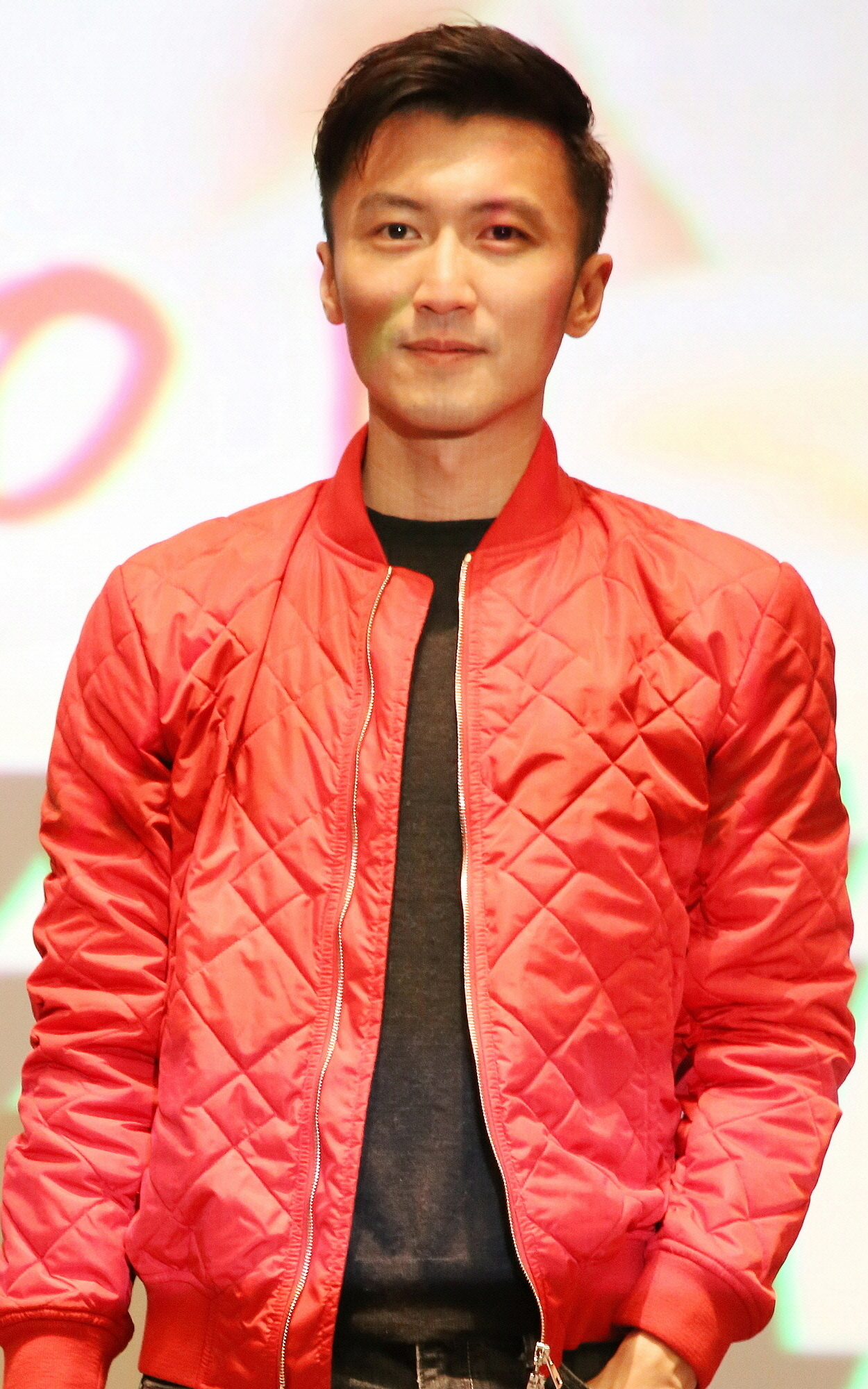 2017.2.13 决战食神合肥路演 谢霆锋